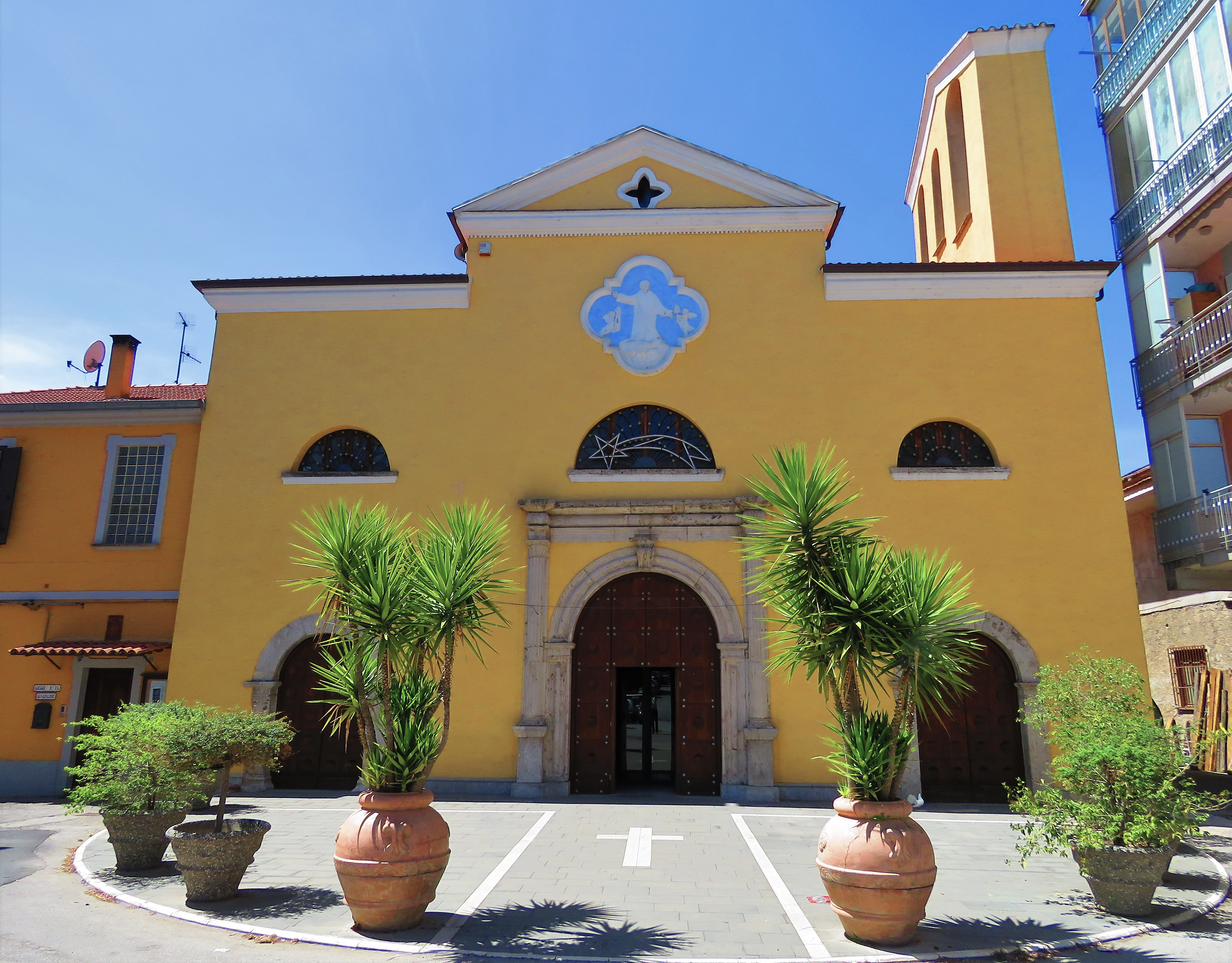 Parrocchia S. Nicola Di Mira. Auletta